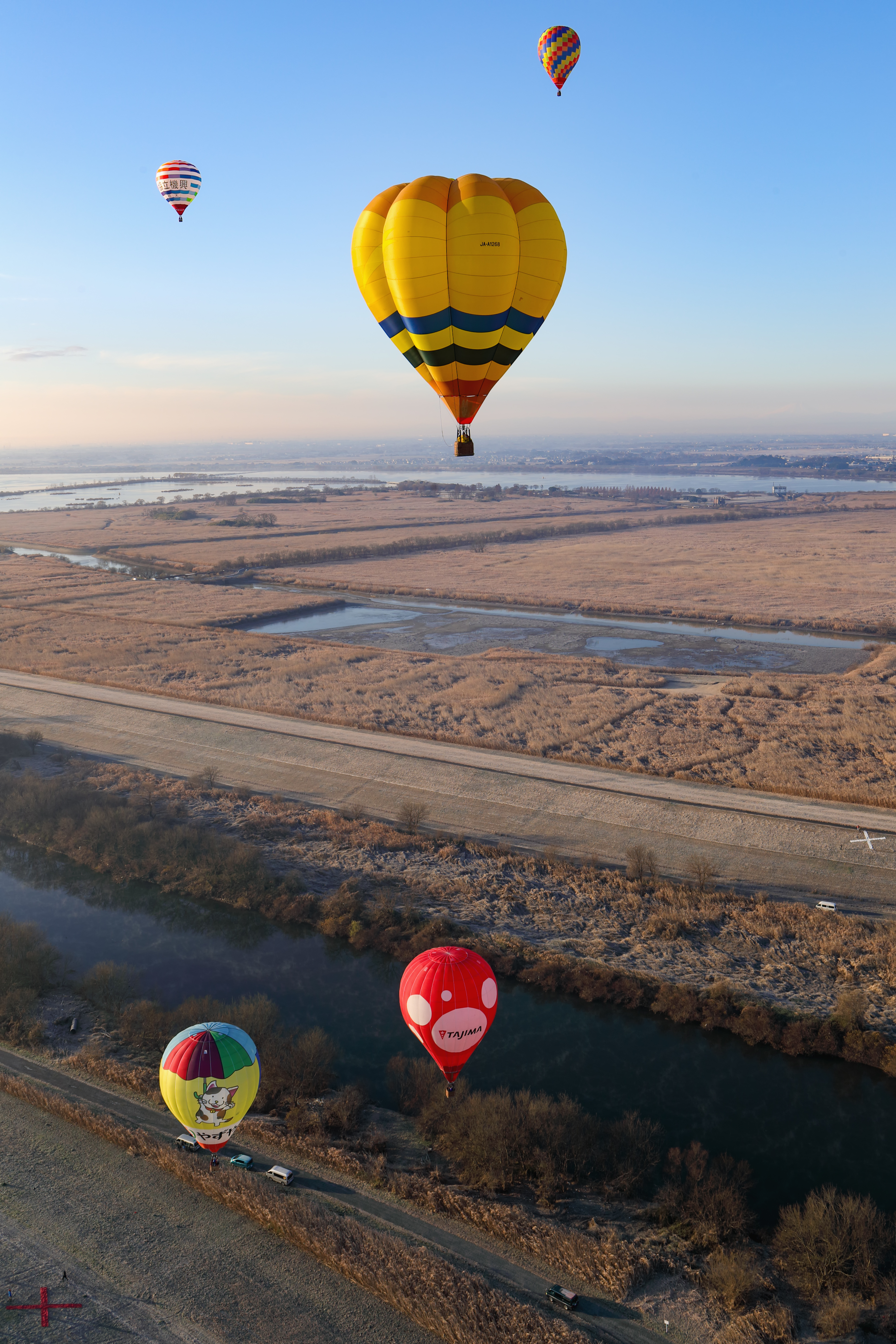 2017年に開催された、渡良瀬カップ「12月の風」、複数のタスクが実施される。 画像左下の赤色×印と画像右中央やや下の白色×印が、タスクで設定されたターゲット。